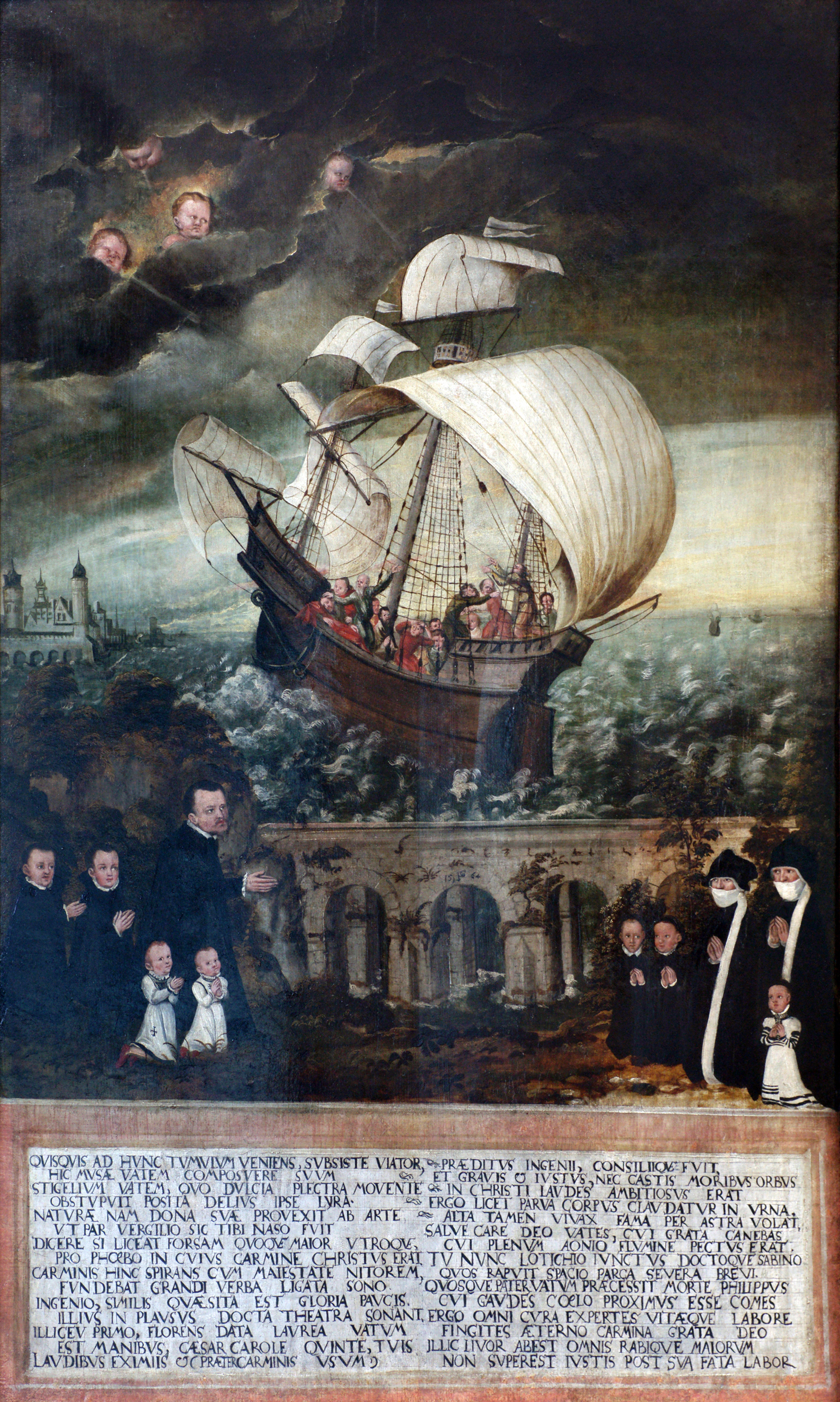 Epitaph für Johann Stigel, 1564, Friedrich-Schiller-Universität Jena